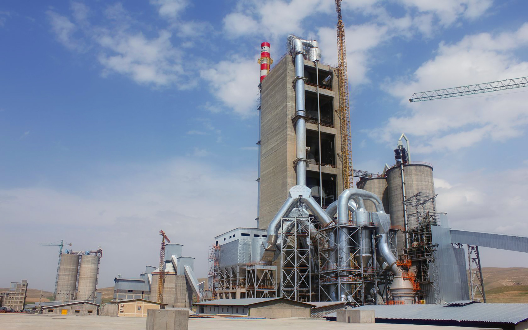 نمایی از کارخانه سیمان بزرگ کاوان بوکان